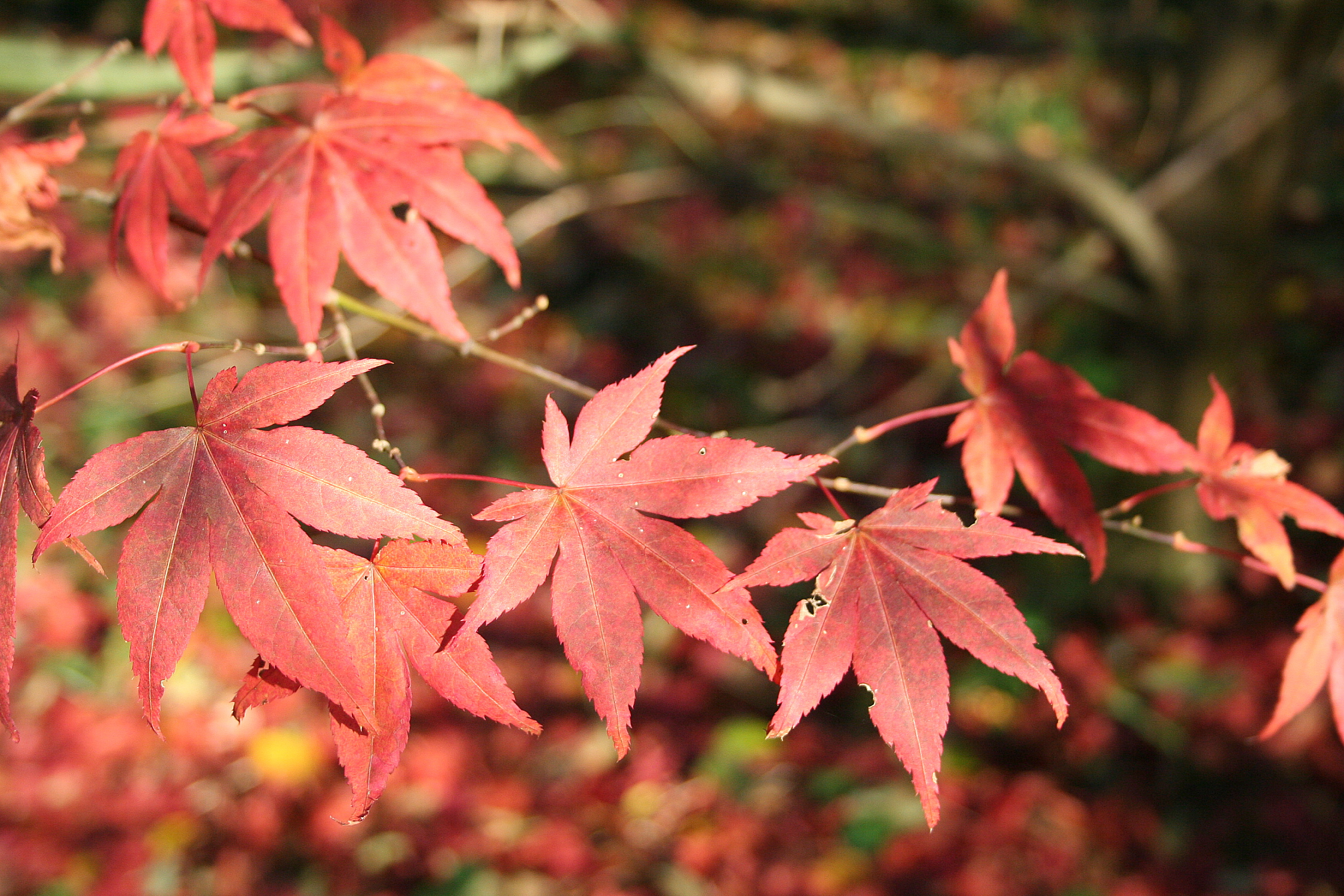 Feuilles de l'érable du Japon Var. 'Atropurpureum' Acer palmatum 'Atropurpureum'